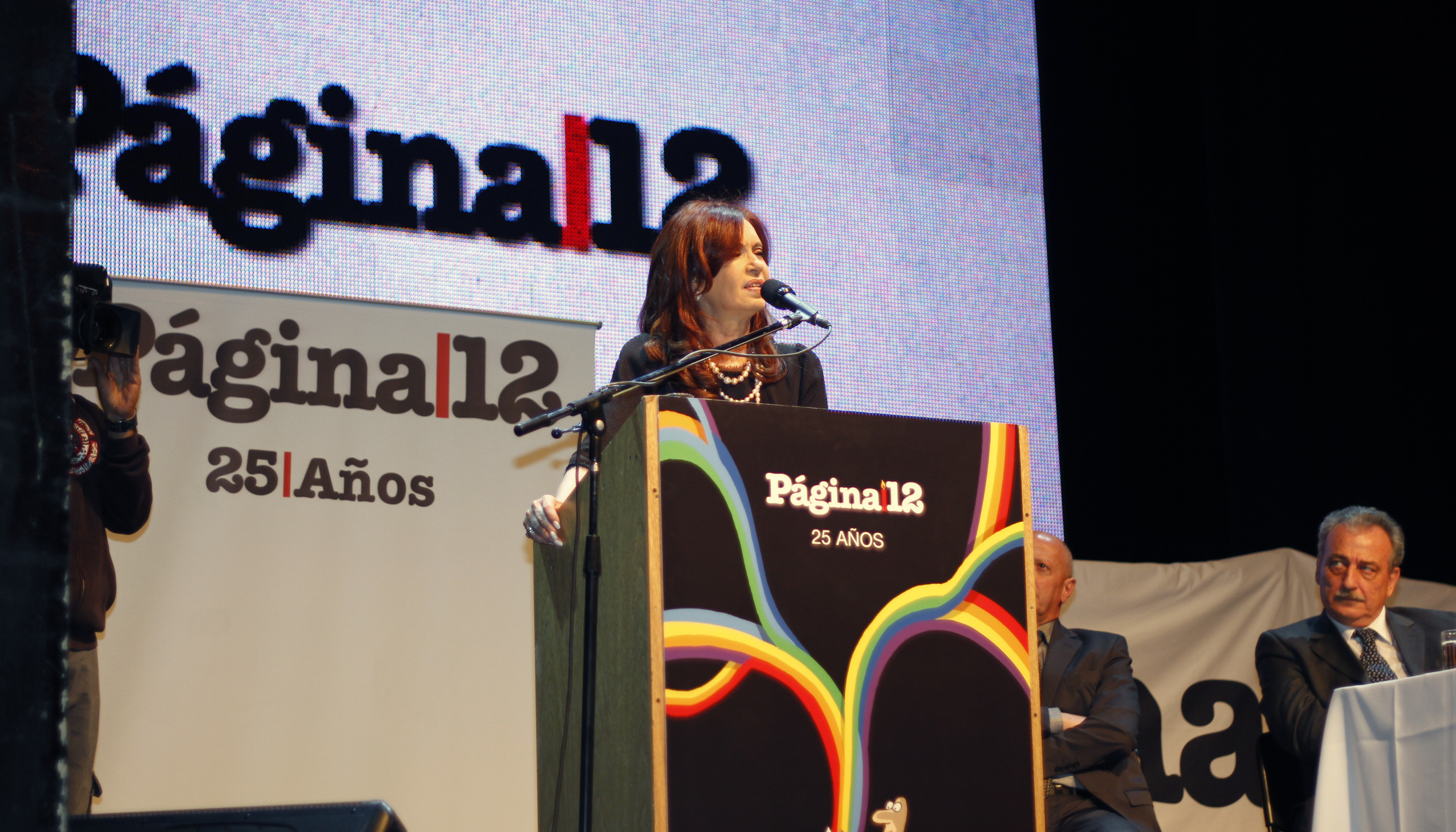 Presidenta de la Nación, Cristina Fernández de Kirchner, en el 25 aniversario de la fundación del diario Página/12, en el CCM Haroldo Conti.